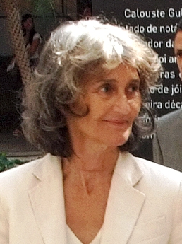 Teresa Gouveia at Exponor